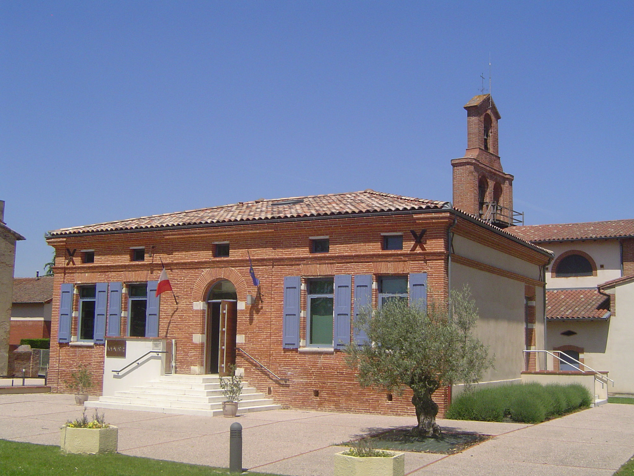 Mairie d'Odars